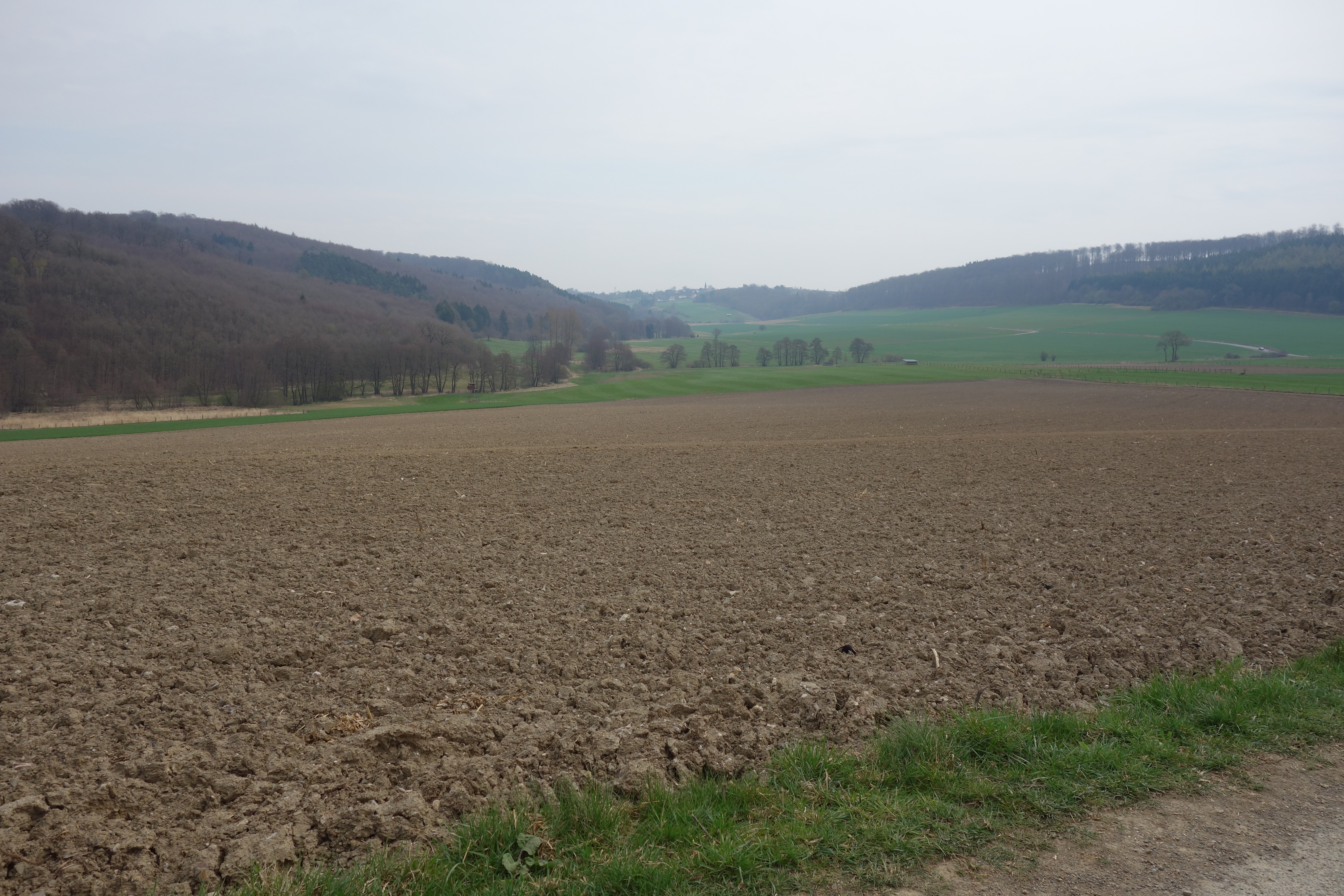 Offenland gehört zum Landschaftsschutzgebiet „Freiflächen im Lühlingsbachtal“ in Brilon. Die Waldbereiche im Hintergrund gehören zu zwei Naturschutzgebieten. In der Bildmitte ist im Hintergrund schemenhaft Bleiwäsche zu erahnen.